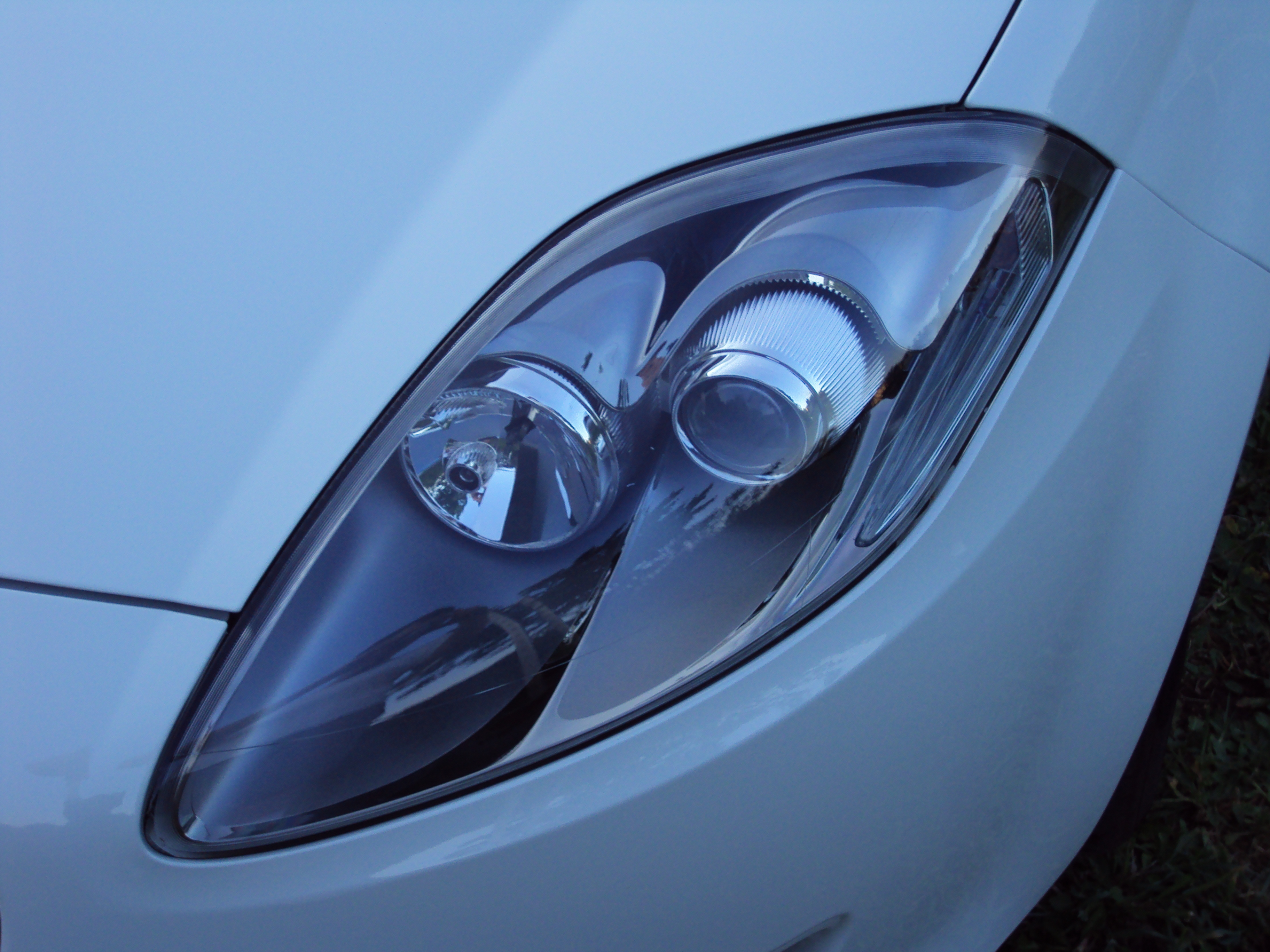 Permet de différencier la phase 1 de la phase 2